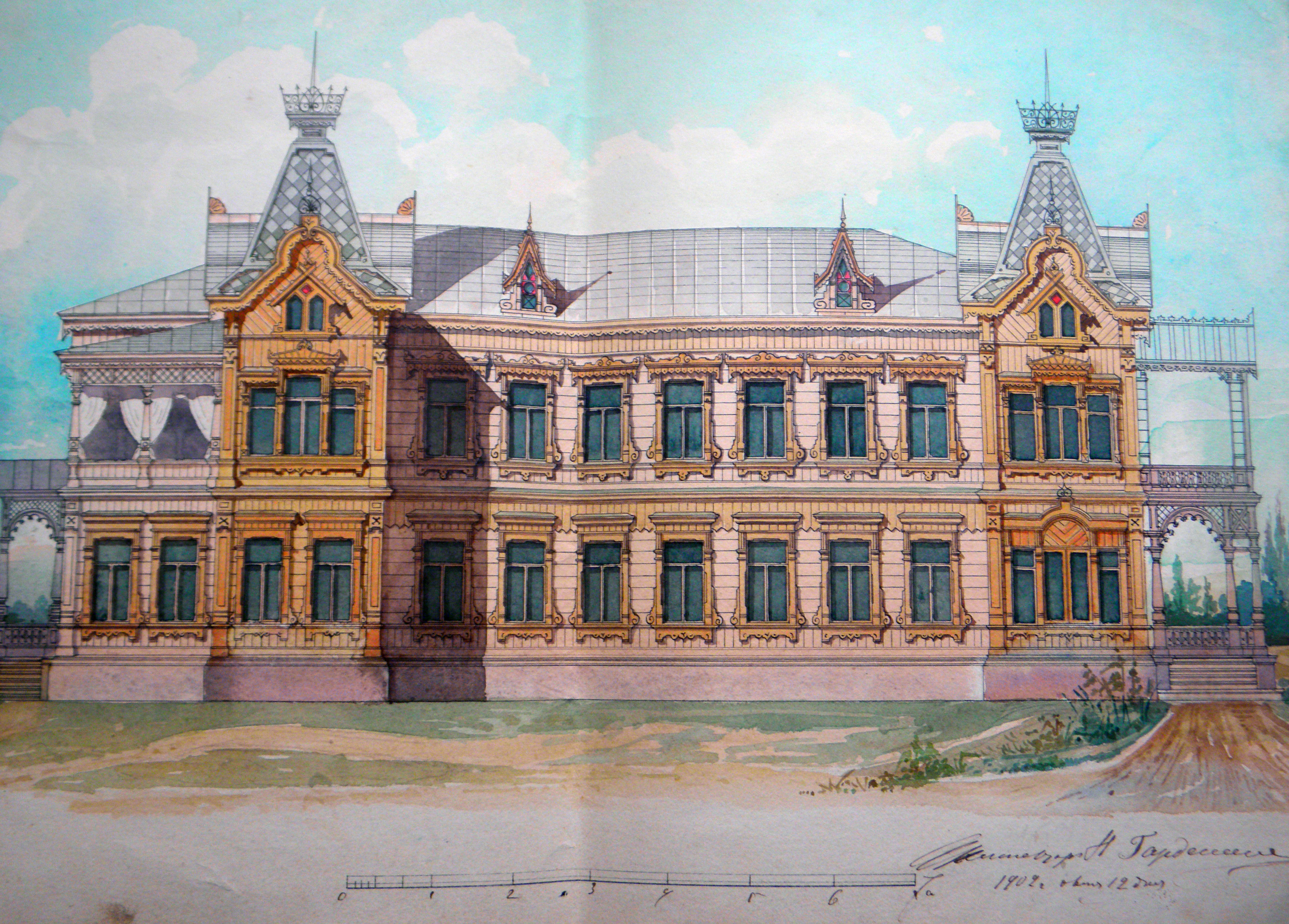 за матеріалами Київського обласного архіву (опис 115)